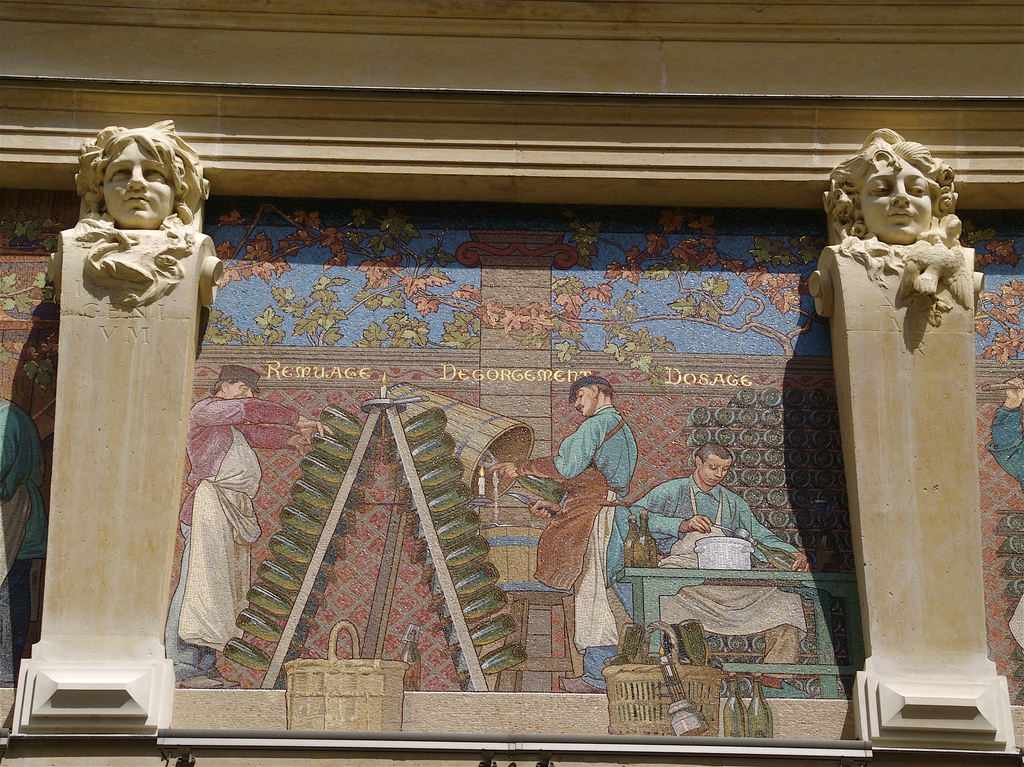 Façade du Cellier d'expédition de la Société de champagne Mumm — 4bis rue de Mars, Reims, Champagne-Ardenne, France.